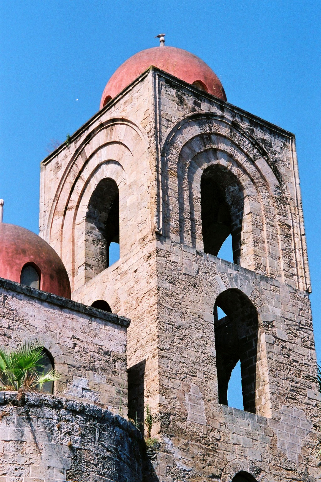 San Giovanni degli Eremiti, Palermo The tower